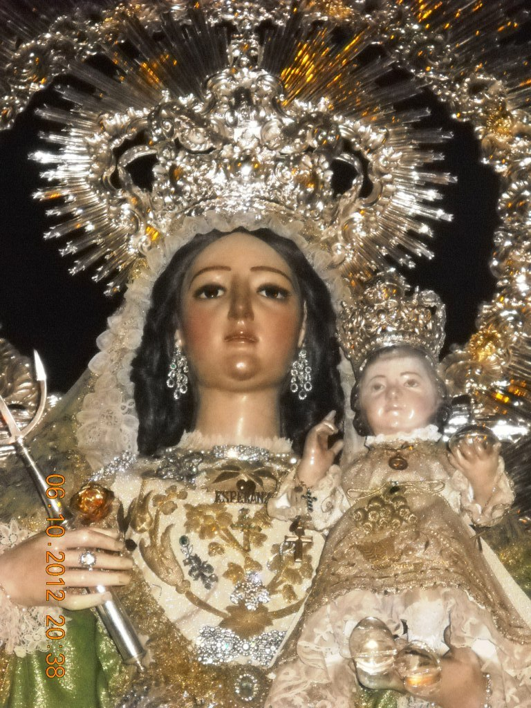 Virgen de la Esperanza Divina Enfermera, titular gloriosa de la Hermandad, que procesiona en octubre